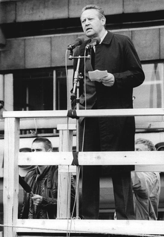 ADN-ZB Link 4.11.89 Berlin: Demonstration 500.000 Bürger beteiligten sich an einer Demonstration für den Inhalt der Artikel 27 und 28 der Verfassung der DDR. Auf dem anschließenden Meeting auf dem Alexanderplatz ergriff auch Günter Schabowski, Mitglied des Politbüros und 1. Sekretär der Bezirksleitung Berlin der SED, das Wort.